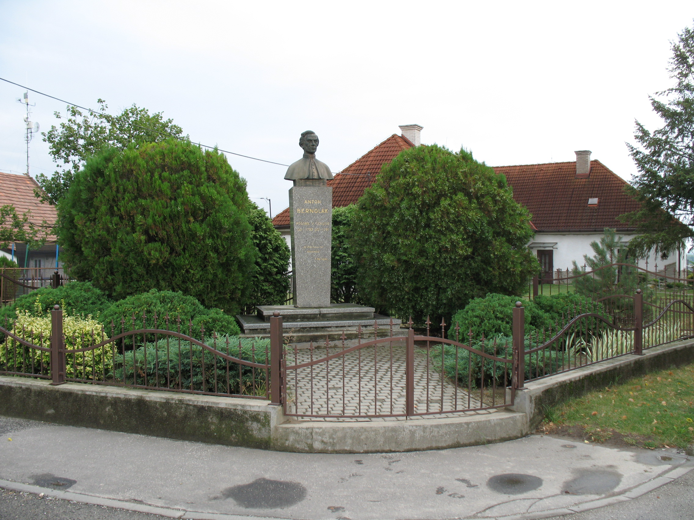 Bernolák szobor